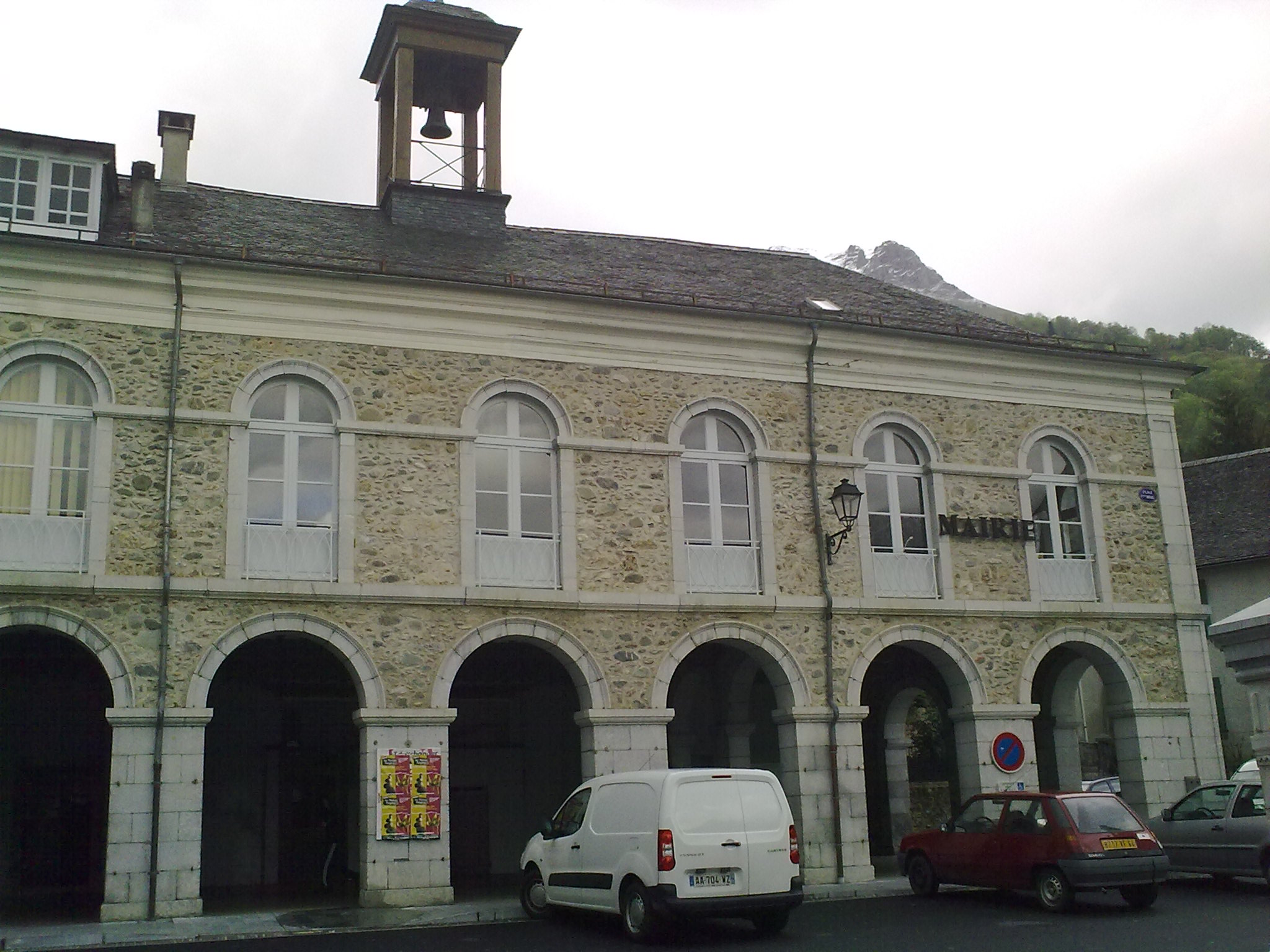 Bedous, France